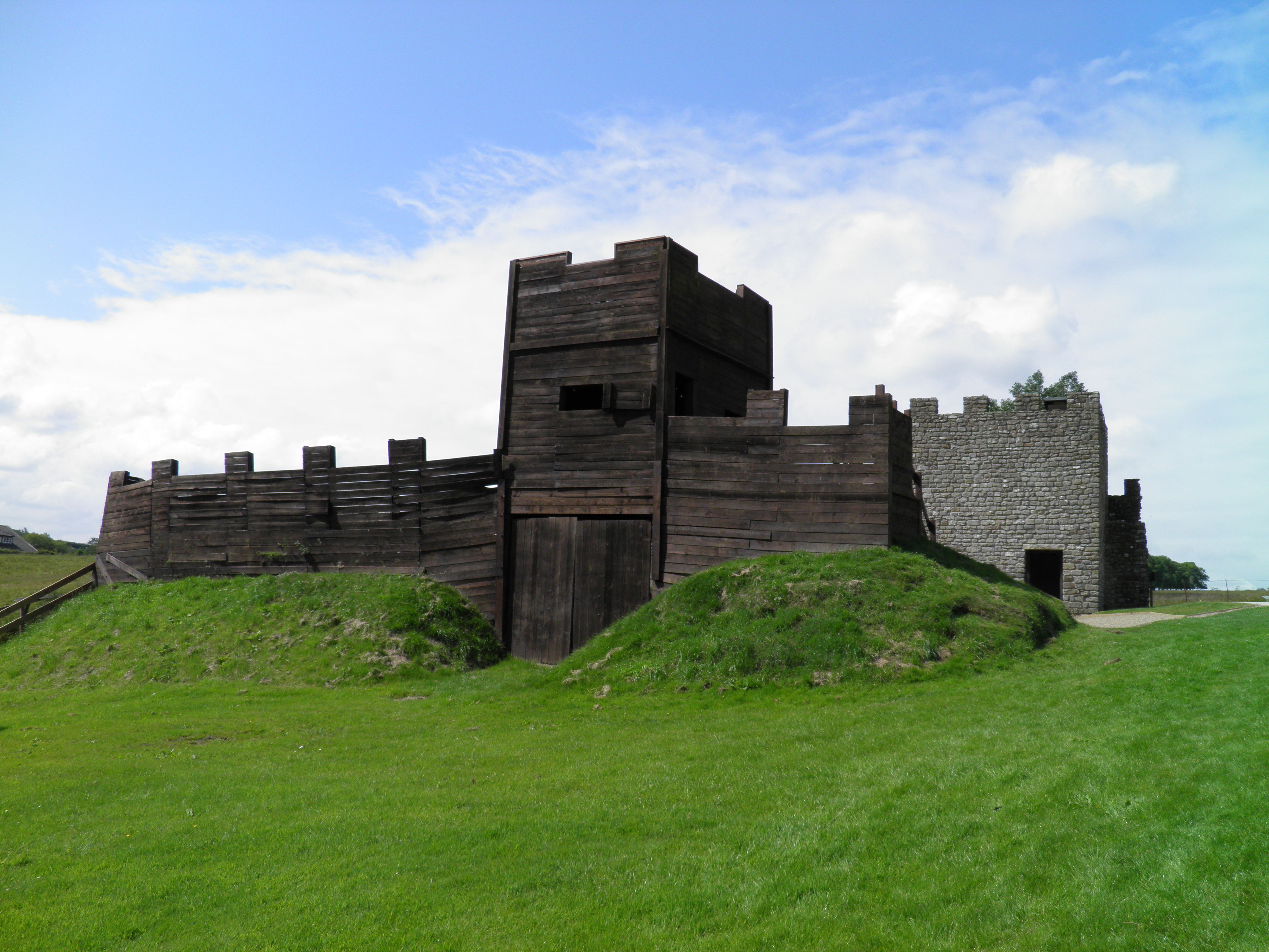 Vindolanda fort, UK